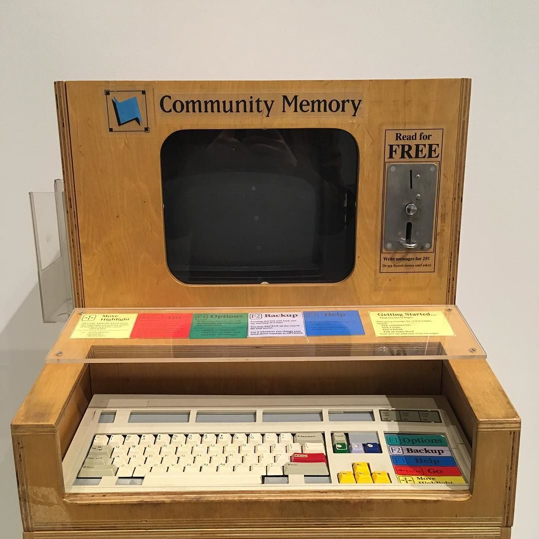 via Instagram ift.tt/2mTWUyl